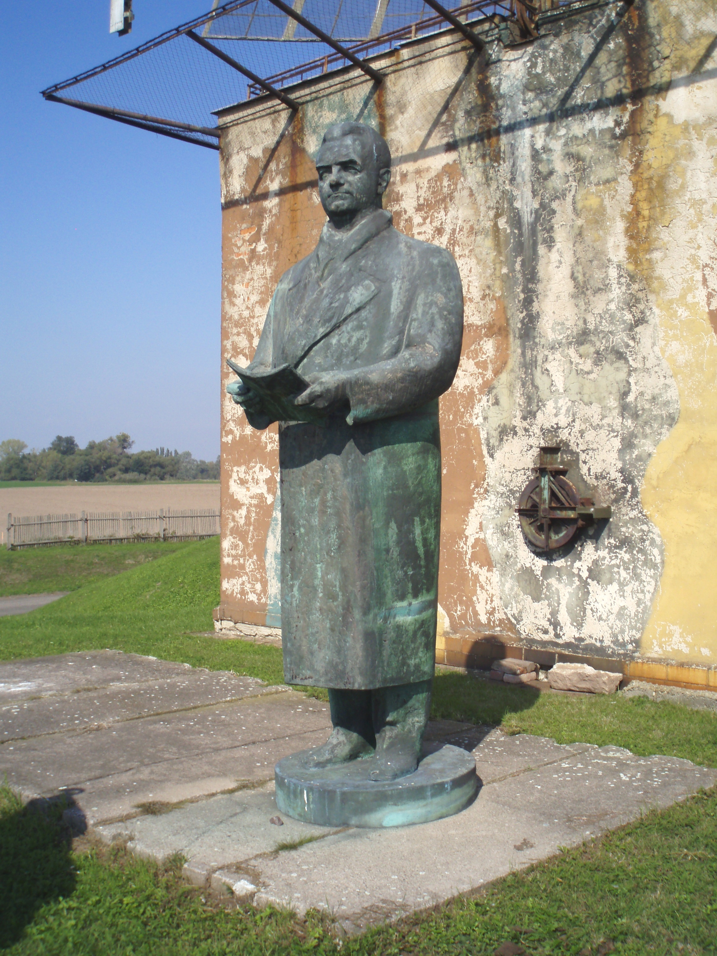 Socha Klementa Gottwalda z královéhradeckého pomníku.